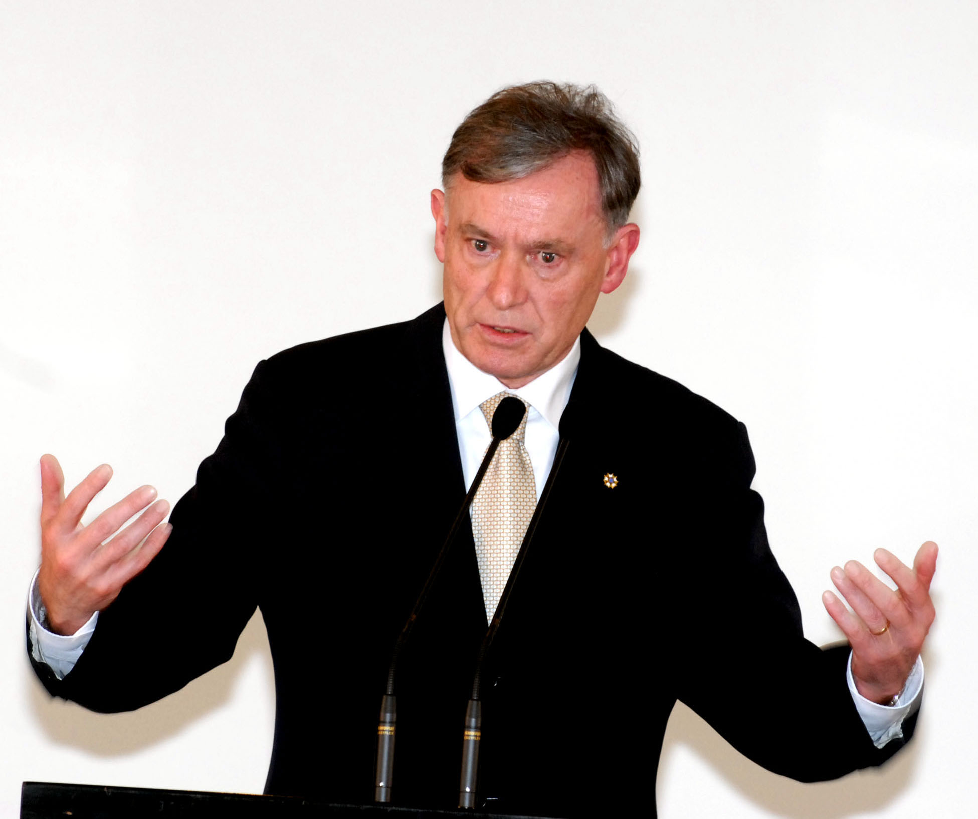 O presidente da Alemanha, Horst Köhler, em Brasília.